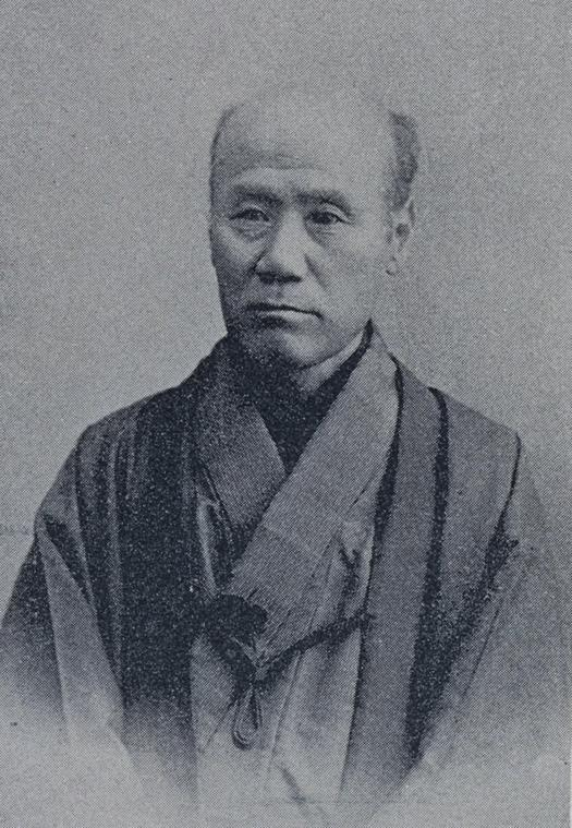 向山黄村(一履)の肖像写真。